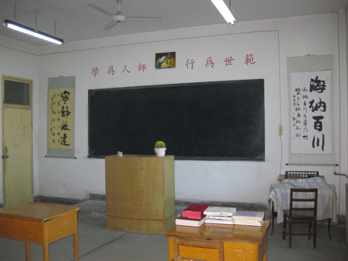 陕神教室之一